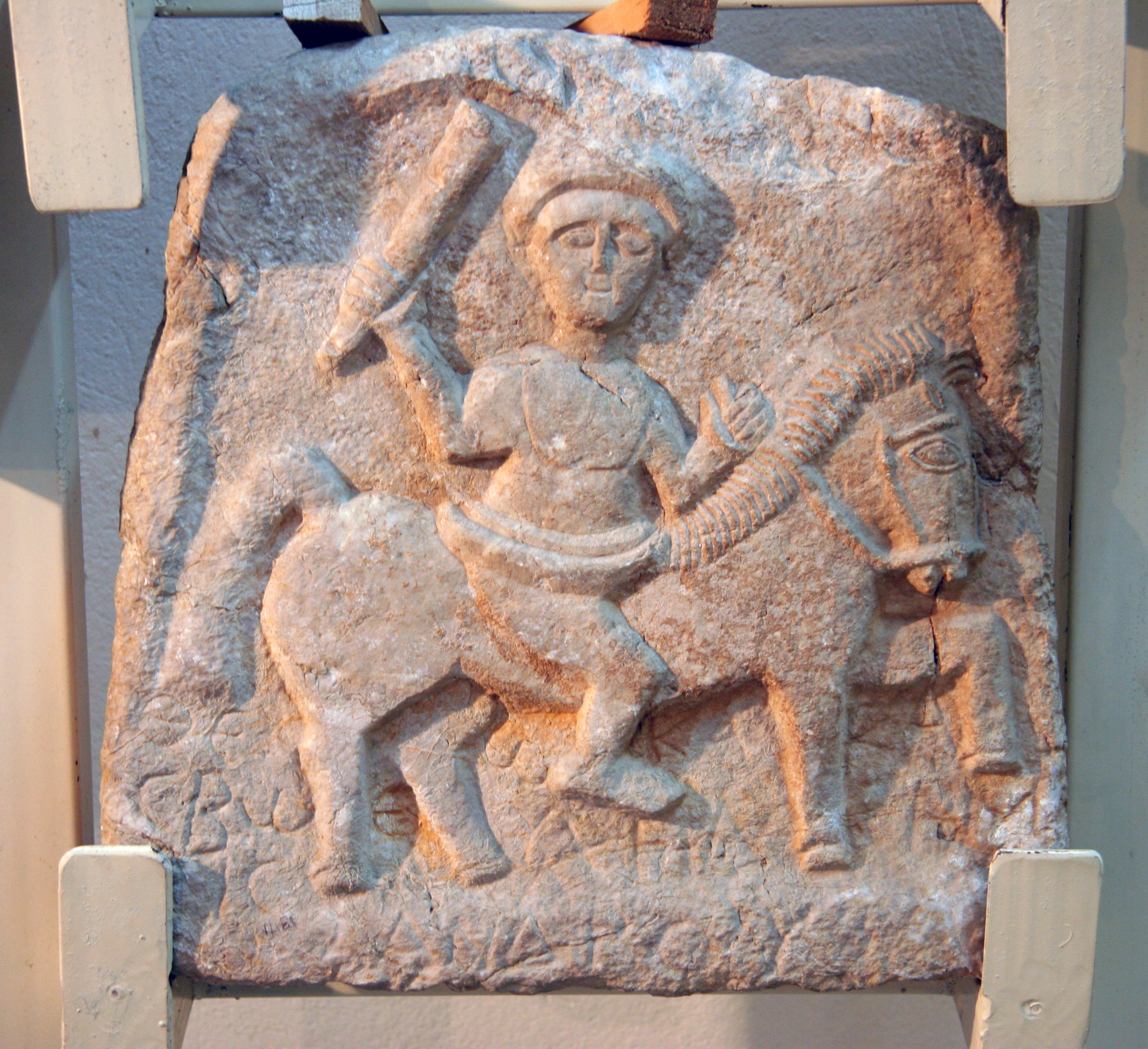 Stèle dédiée à Kakasbos, Musée de Fethiye, inv. 2.11.79.1481 IIIe- IVe s. p.C. Calcaire; H. 30; L. 35.7; É. 10; Pr. 0.7. Lieu de découverte : Nord d’Oinoanda (selon l’inventaire du Musée de Fethiye)